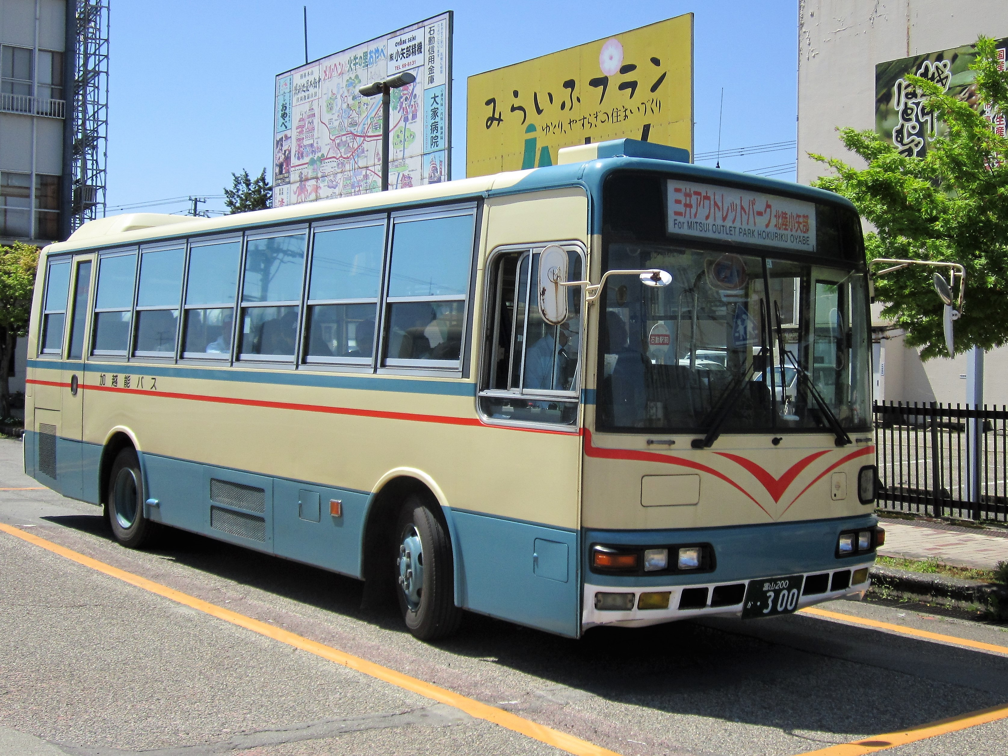 石動駅前に停車中の加越能バス Canon PowerShot A2200